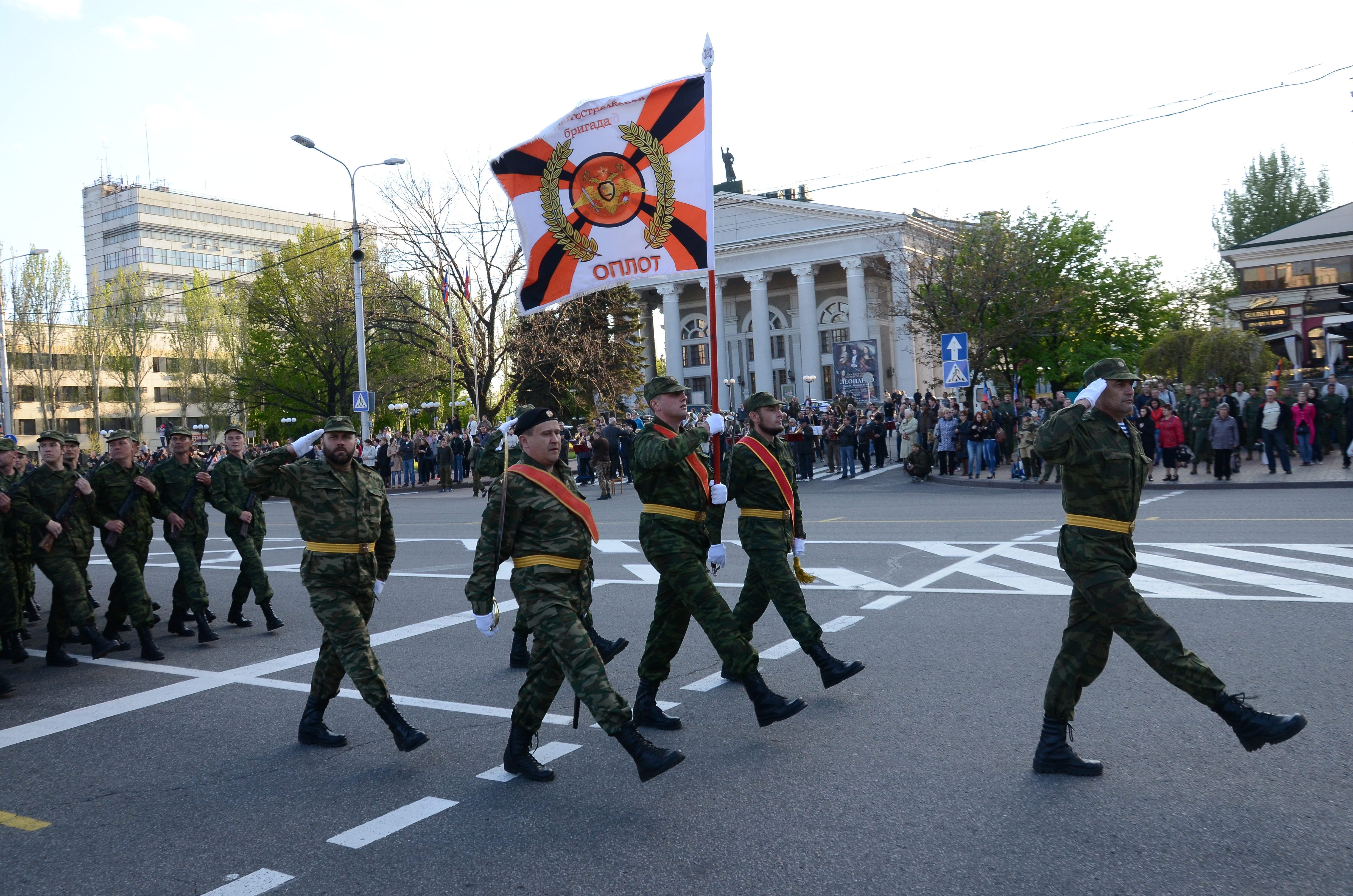 Репетиция парада в честь дня Победы в Донецке